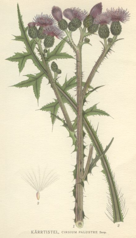 Cirsium palustre